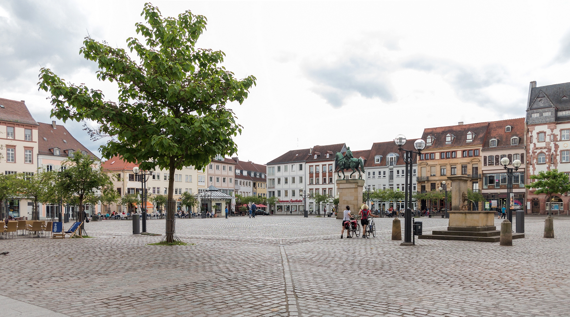 Der Rathausplatz in Landau in der Pfalz